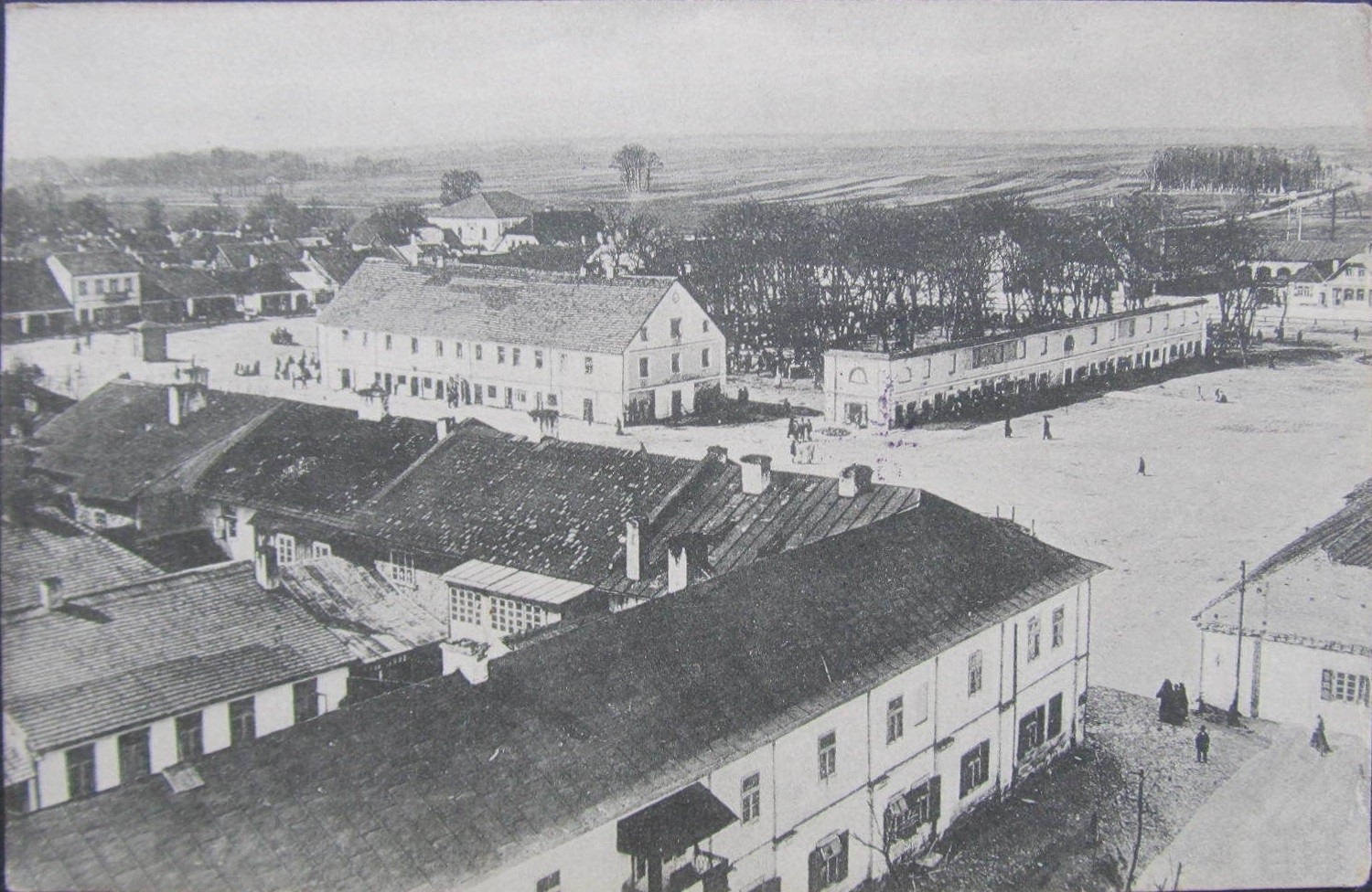 Widok na Rynek w Biłgoraju, początek XX w. Widoczne m.in. Ratusz (na środku placu) i synagoga (w tle).